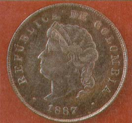 Moneda colombiana de 1887 en la que aparece Soledad Román de Núñez, la moneda fue llamada cocobola como una ofensa a la esposa del Regenerador